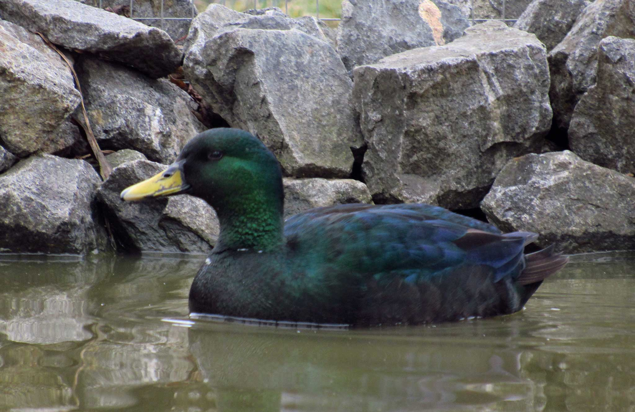 Kachna smaragdová v Zoo Tábor